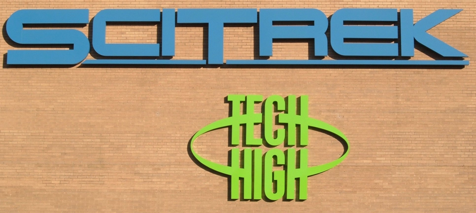 SciTrek in Atlanta, GA, USA